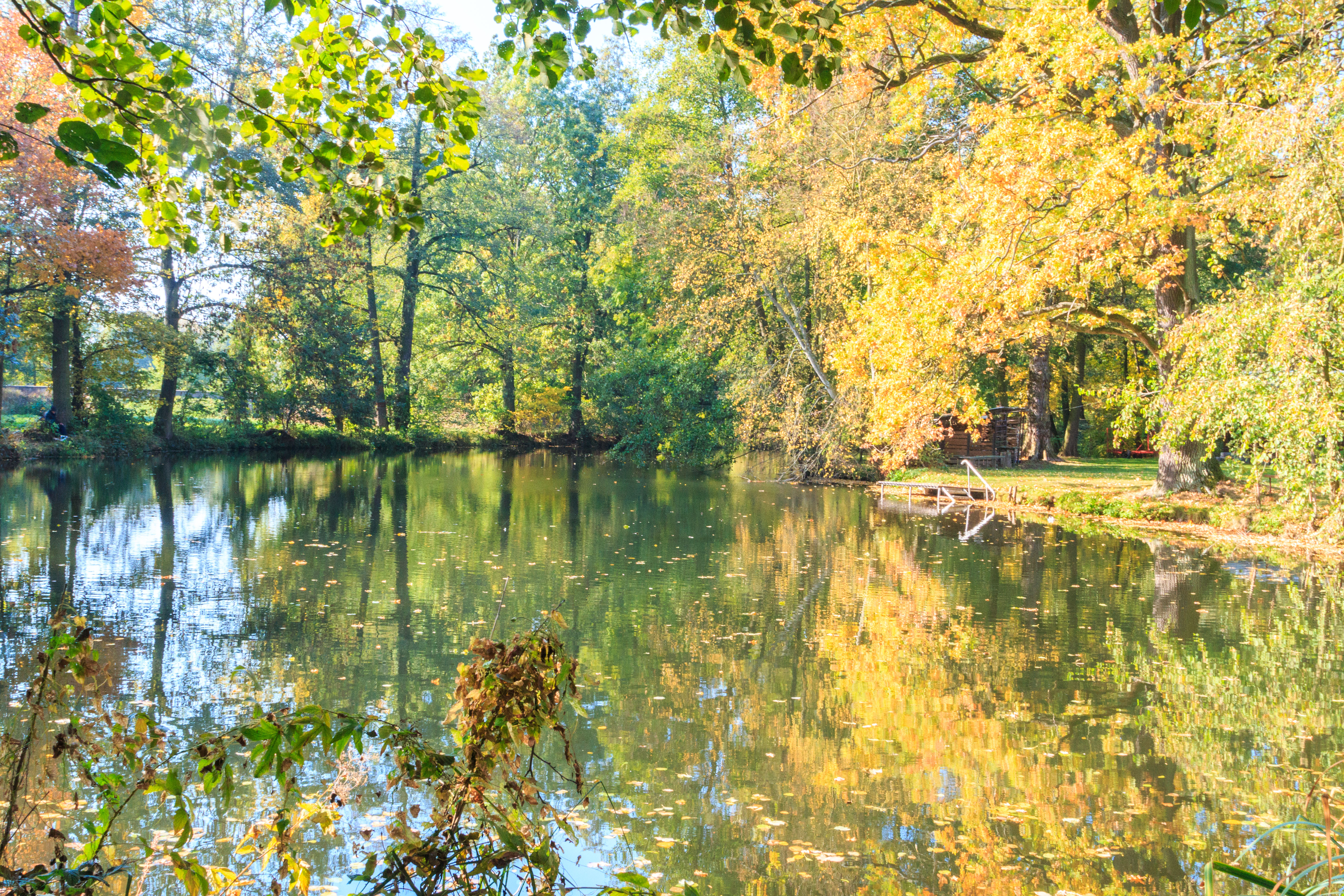 Slepé rameno Orlice u loděnice u Malšovic Project: Vodstvo.